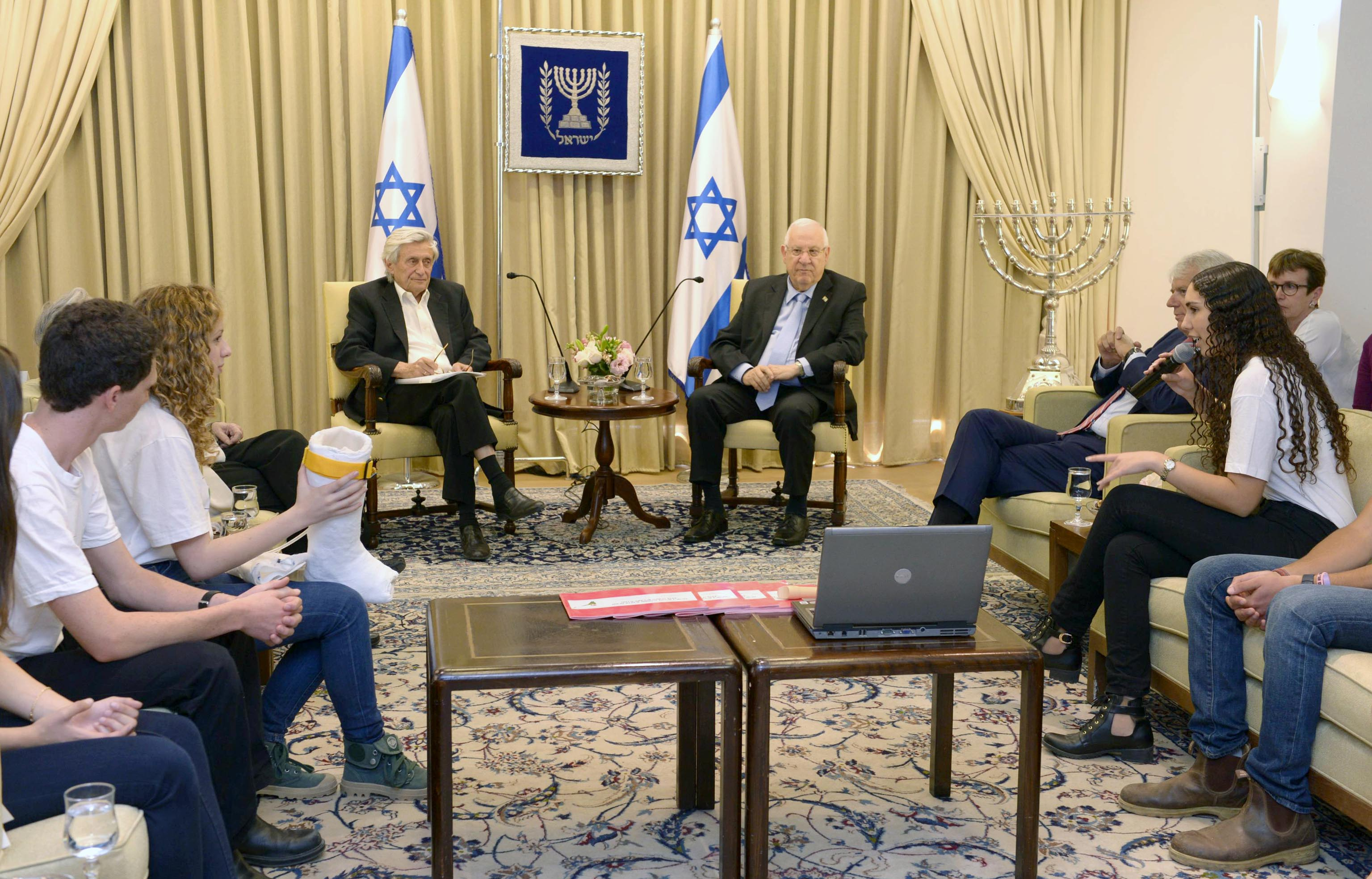 נשיא מדינת ישראל ראובן ריבלין ופרופ' חנוך גוטפרוינד בפגישה עם תלמידי תיכון שזכו בתחרות מדענים ומפתחים לשנת 2015